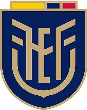 Nuevo escudo de la Federación Ecuatoriana de Fútbol 2020